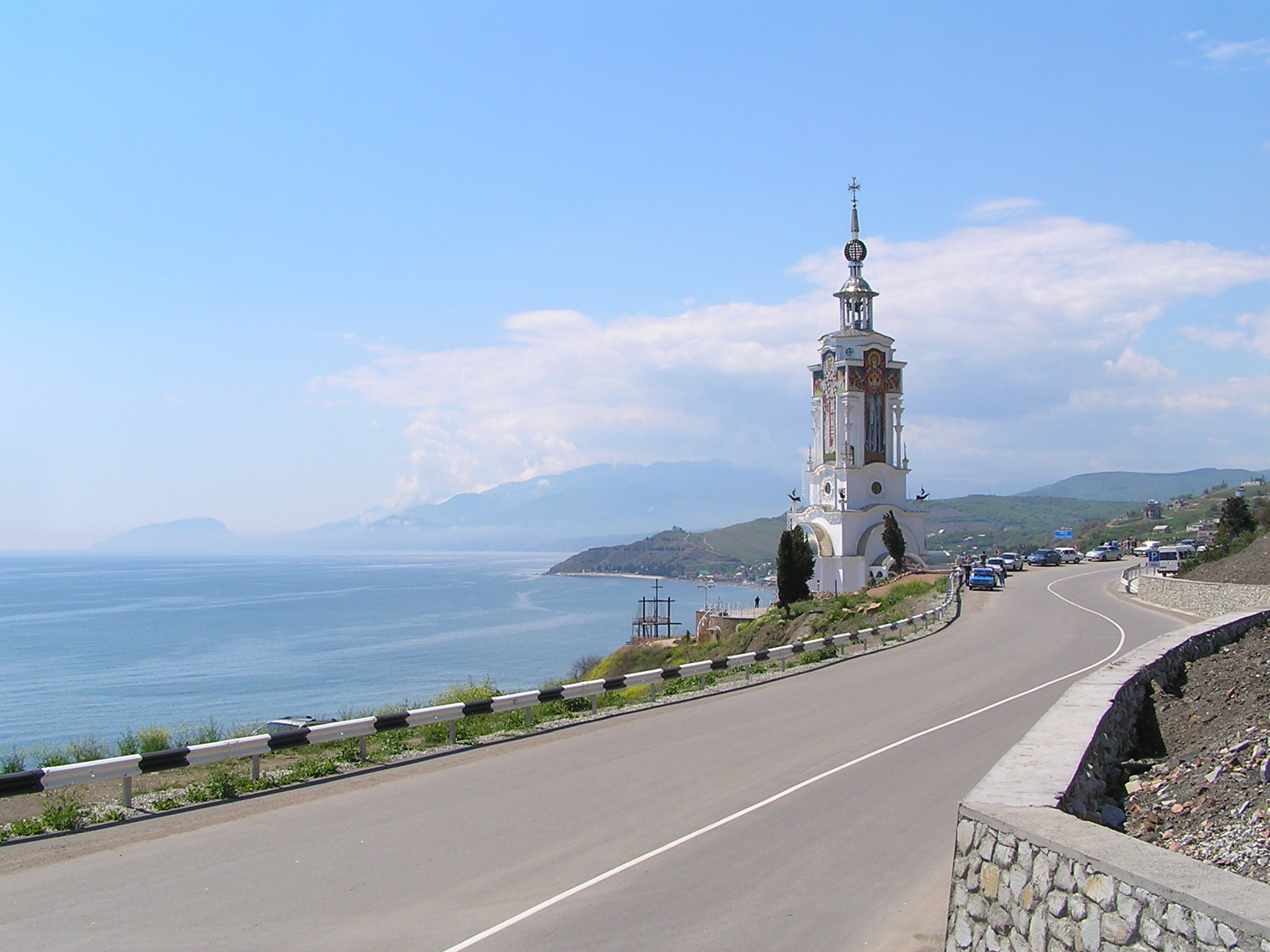 Природно-аквальний комплекс біля с. Сонячногірське та с. Малоріченьське, АР Крим